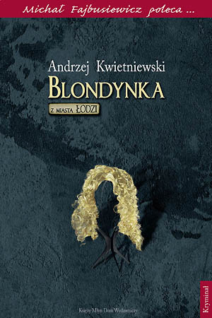 Andrzej Kwietniewski, Blondynka z miasta Łodzi